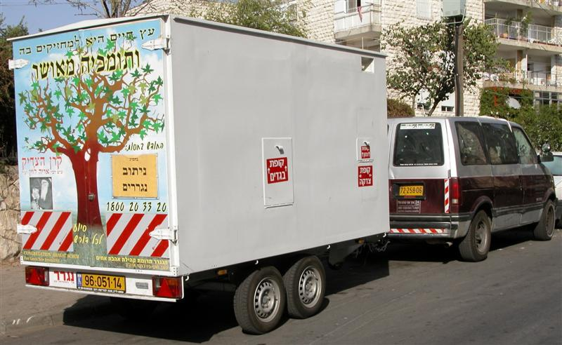 רכב ונגרר לאיסוף מוצרים לגמילות חסדים.